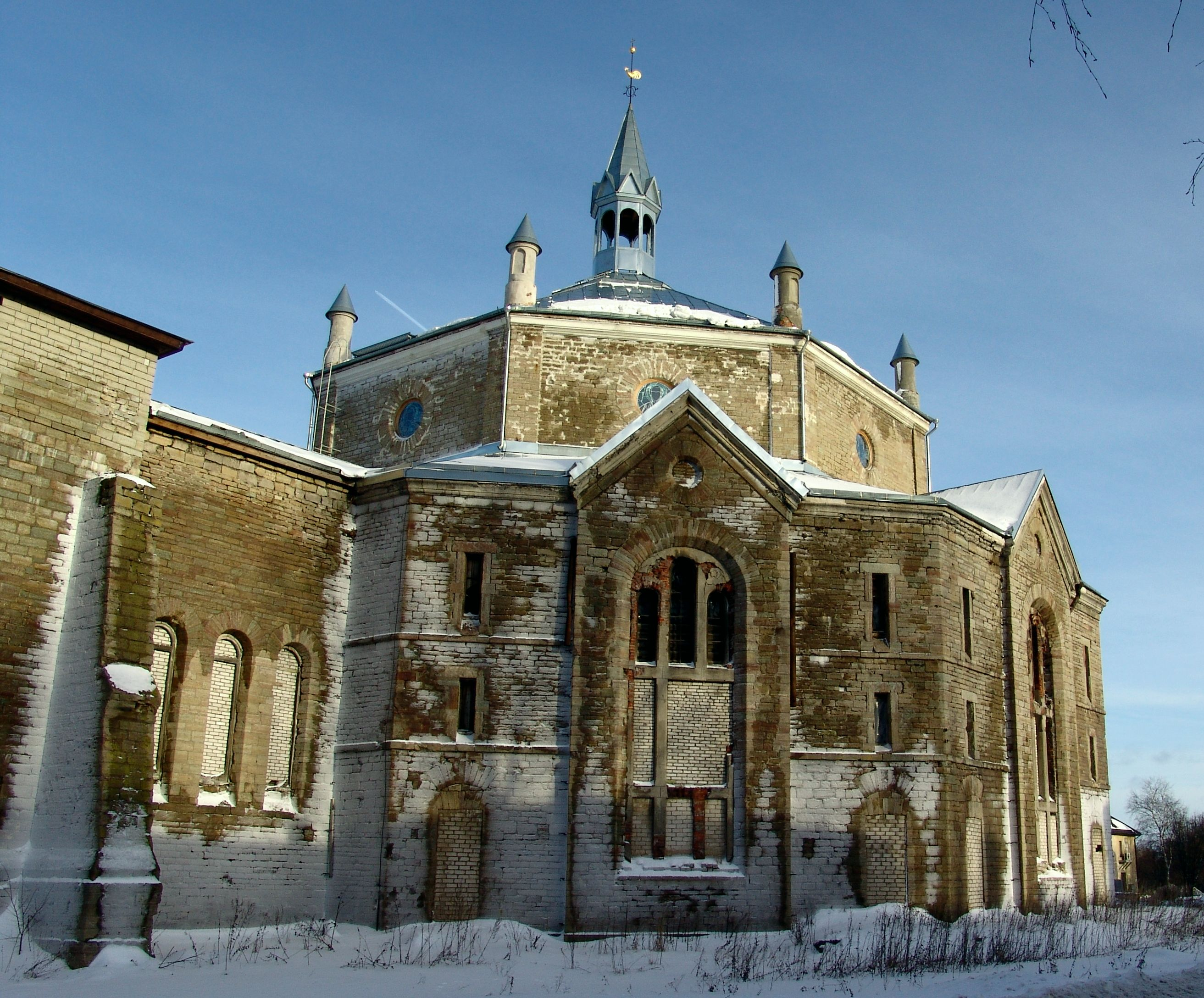 Александровская лютеранская церковь в Нарве